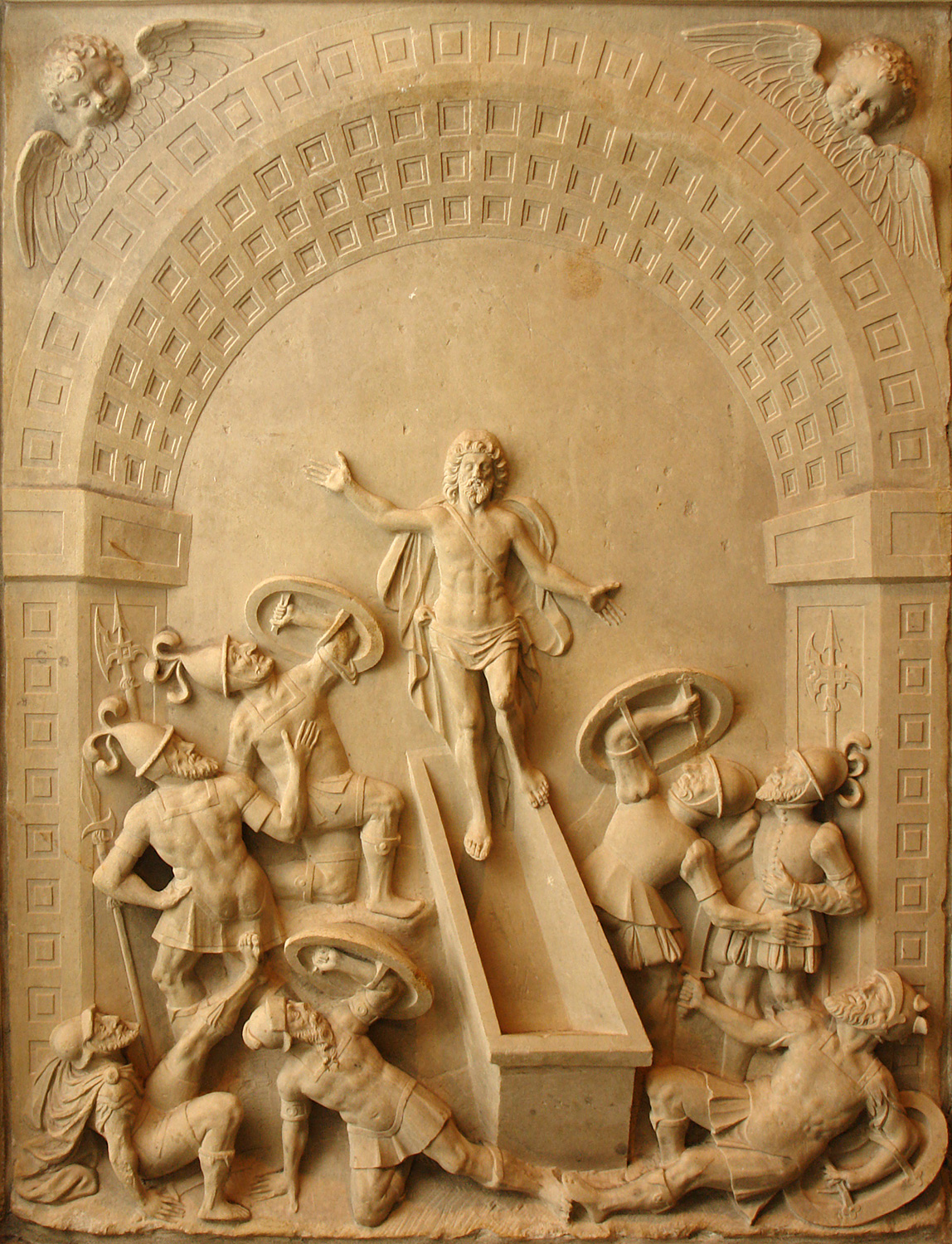 Bremer Dom (Museum): Detail des Epitaph für Gerhard Vaget (letzter Abt des Paulsklosters), gestorben 1567, ursprünglich an einem Mittelschiffspfeiler im Dom. Zuschreibung an Werkstatt Hans Winter. Motiv: Auferstehung Christi